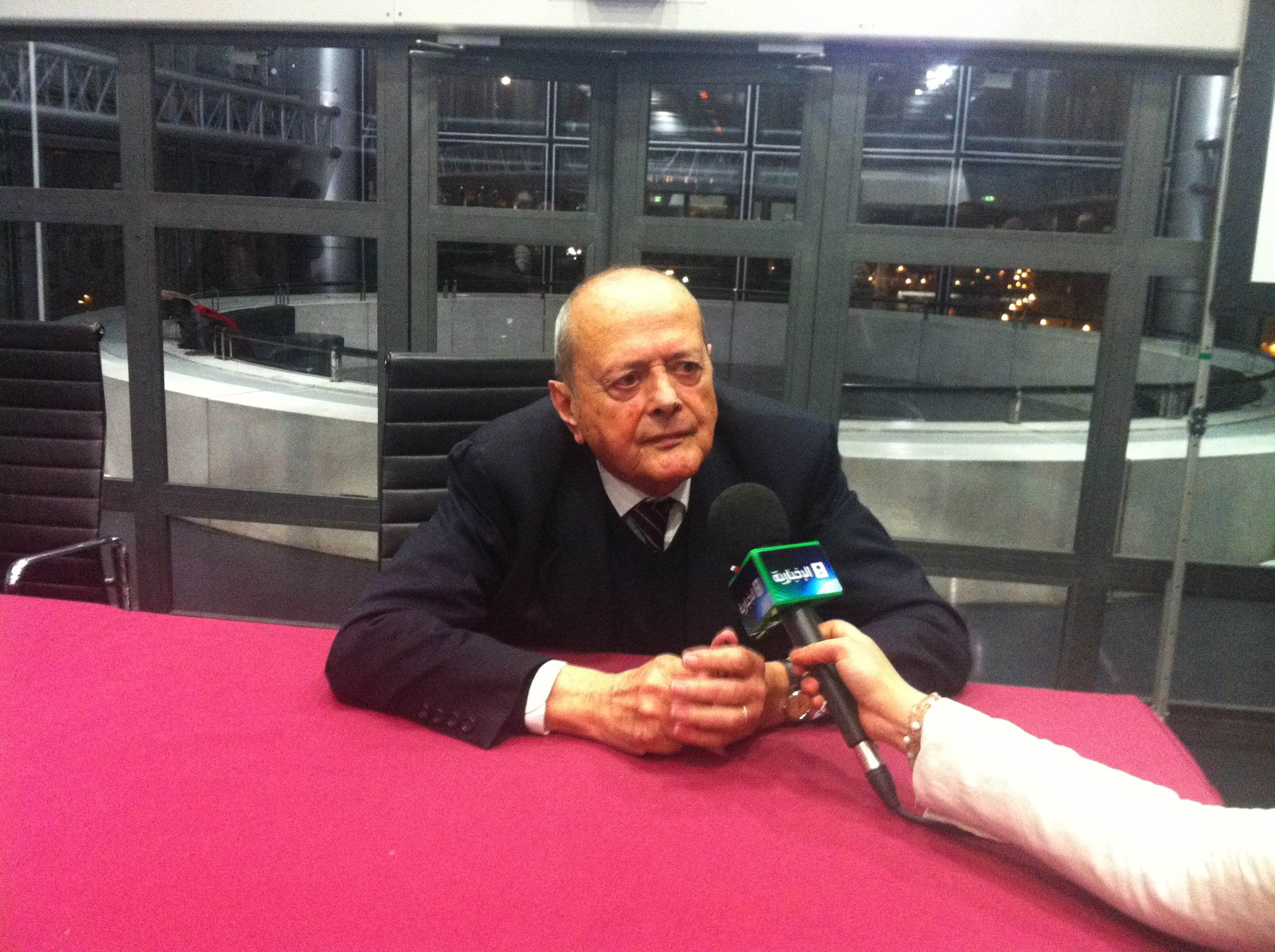 André Miquel lors d'un colloque à l'institut du monde arabe Paris.